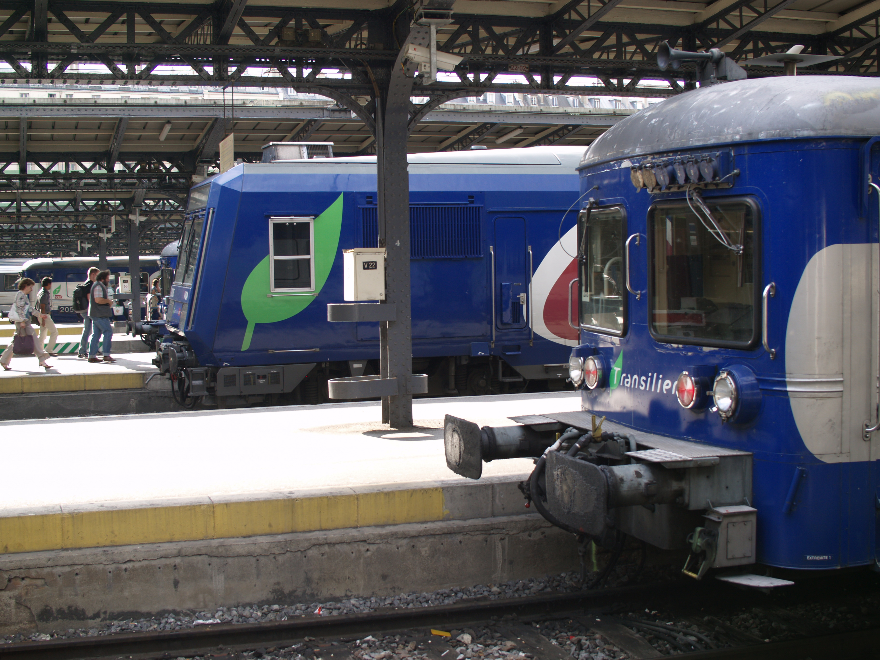 La Gare de l'Est à Paris (France)